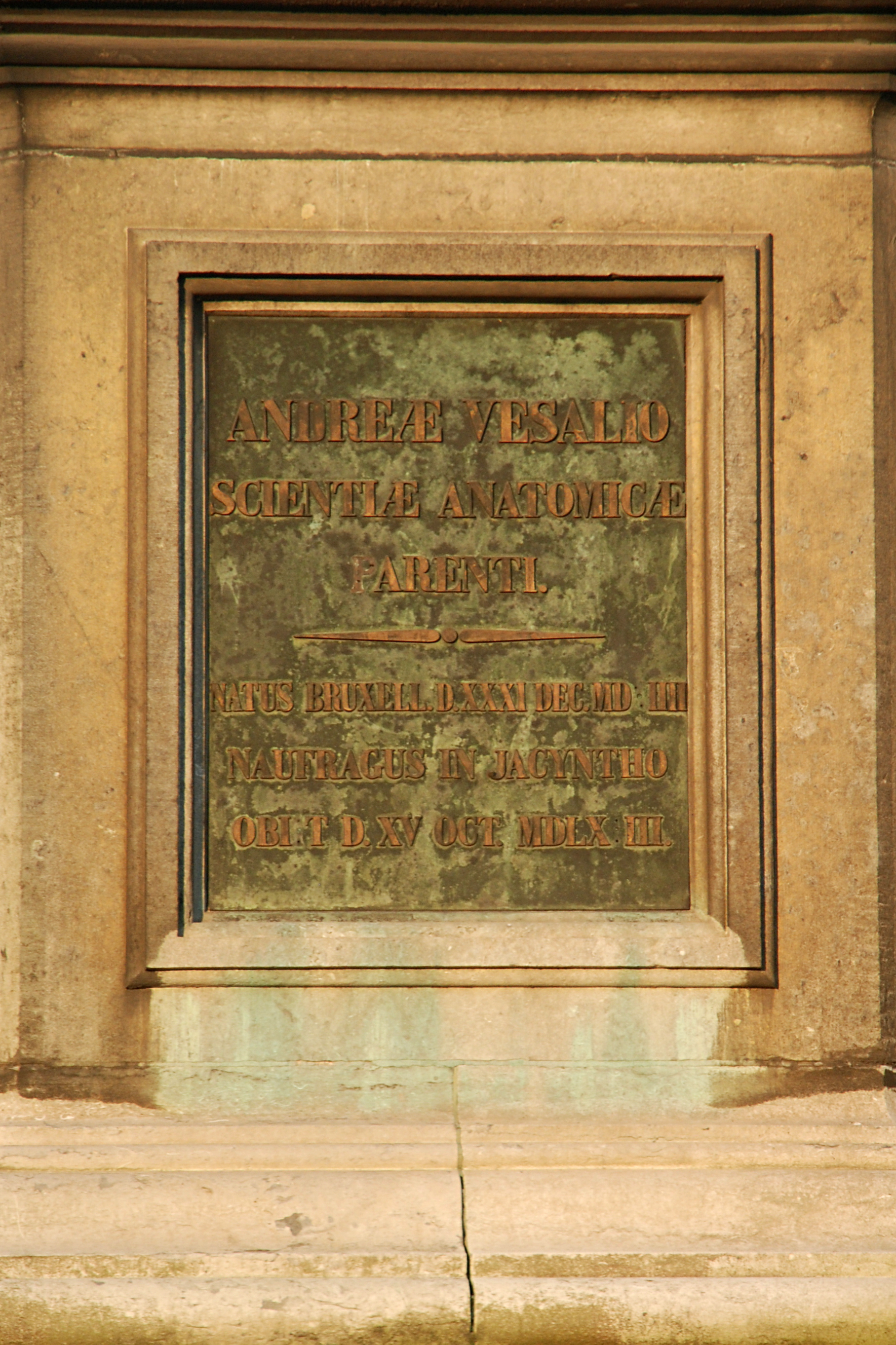 Belgique - Bruxelles - Place des Barricades - Statue d'André Vésale